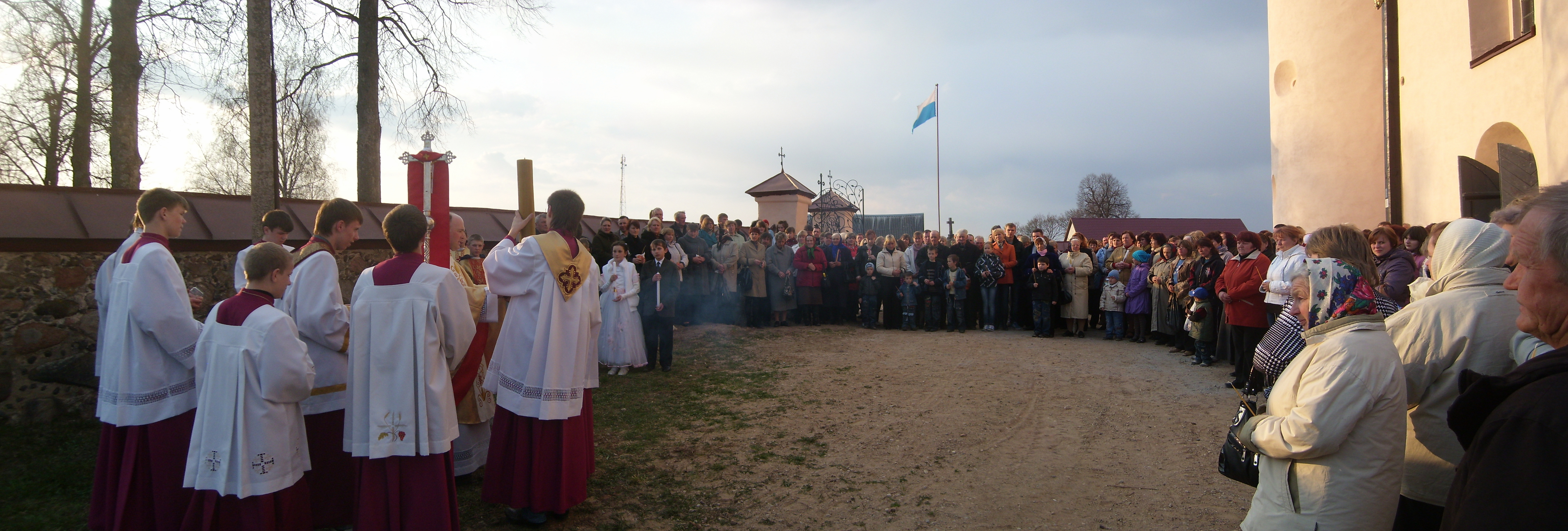 Беларуская (тарашкевіца): Касьцёл Сьвятога Яна Хрысьцiцеля, дэкаратыўнае аздабленьне інтэр’ера касьцёла: росьпісы скляпеньняў, алтары, арган, хоры. в. Камаі This is a photo of Belarusian heritage monument. Reference number: 212Г000593 ( WLM)